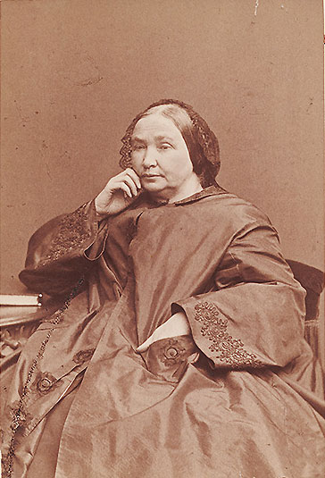 Emilie Flygare-Carlén. Visitkortsfotografi